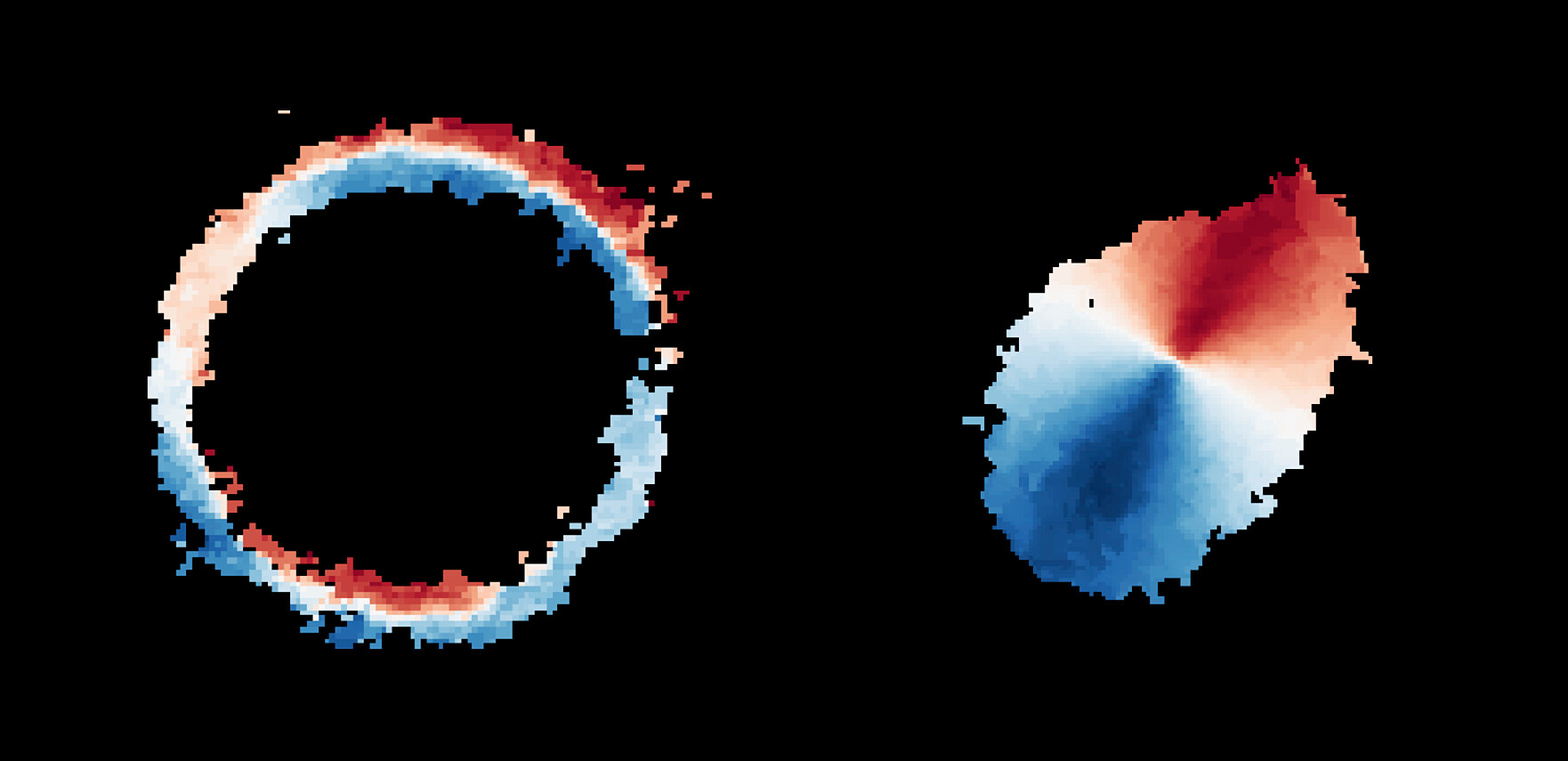 Bild von ALMA